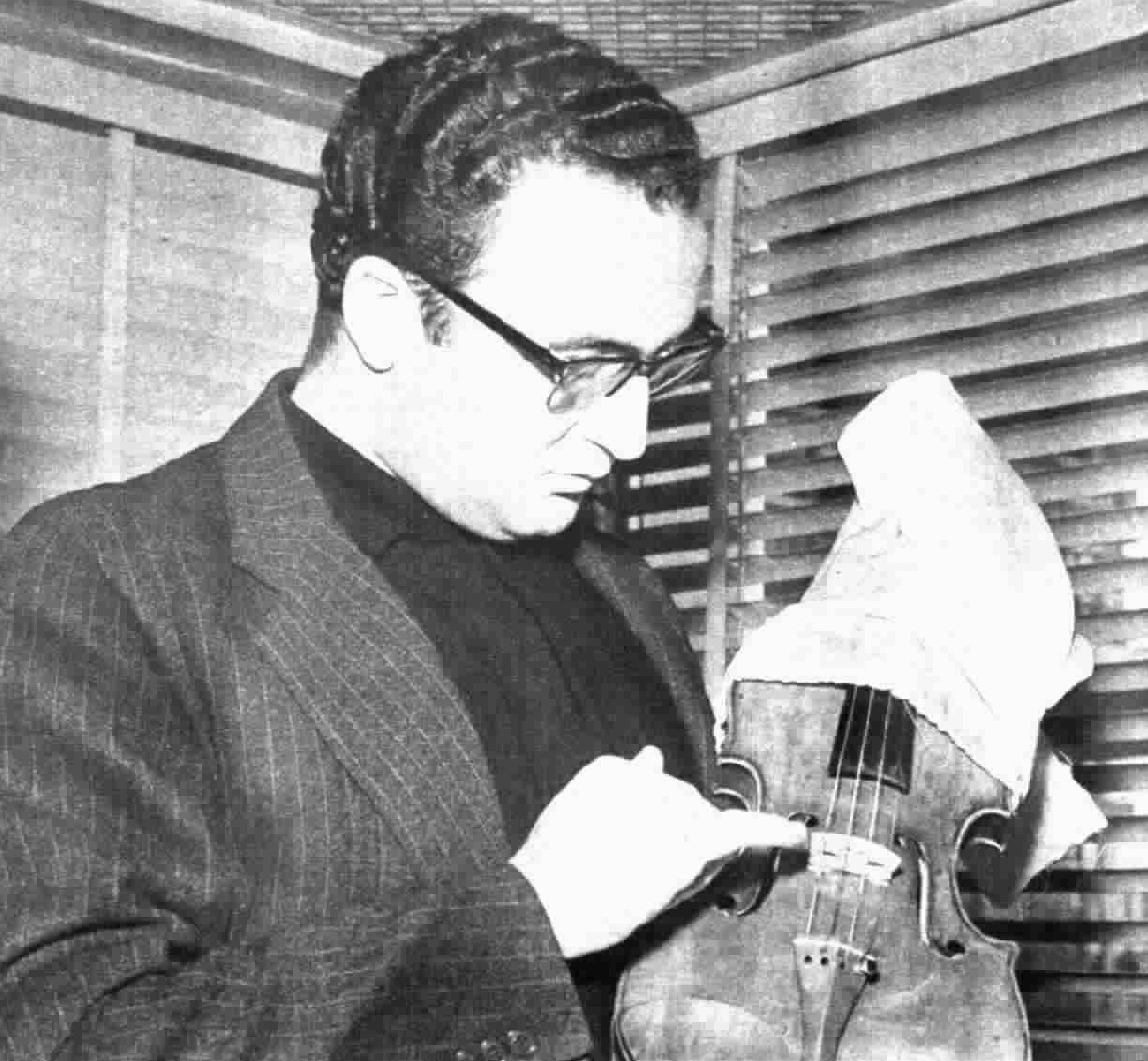 Italian violinist Salvatore Accardo